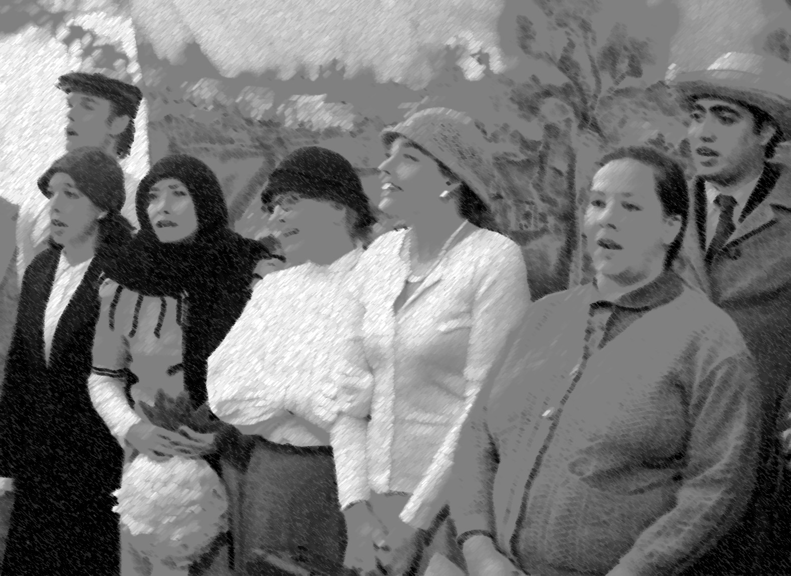 Representación de la llegada de los inmigrantes a la Argentina en la XVII Fiesta Nacional del Inmigrante, en Oberá, Misiones (Efecto tiza y carbón)